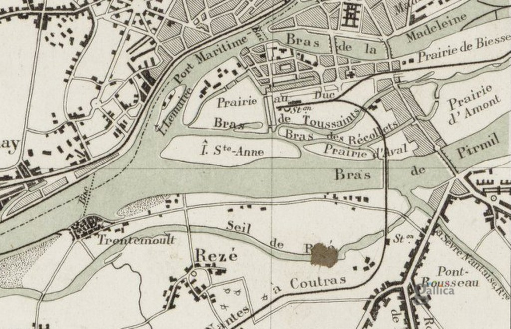 Carte de la Loire, du Seil et de Trentemoult à Rezé en 1883.